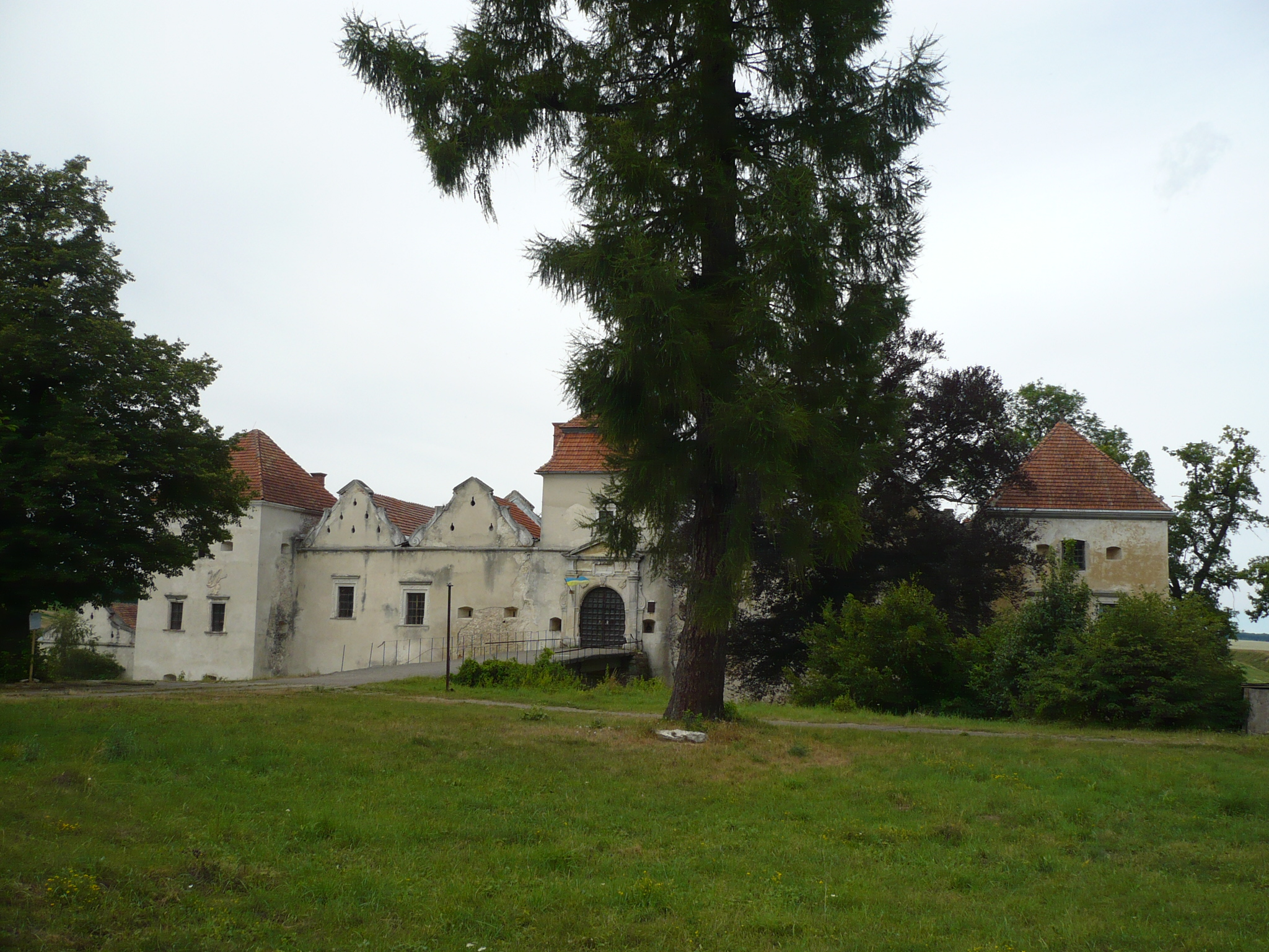 Front zamku w Świrzu na Ukrainie. Zamek stanowił pierwotnie własność książąt Świrskich, od XVII wieku należał do rodu Cetnerów, zniszczony podczas wojen kozackich w 1648, zdobyty przez Turków w 1672. Po pierwszym rozbiorze Rzeczypospolitej znalazł się na obszarze zaboru austriackiego. Ostatnimi właścicielami przed 1939 byli Irena z Lamezanów i jej mąż Tadeusz Komorowski, późniejszy dowódca Armii Krajowej i powstania warszawskiego